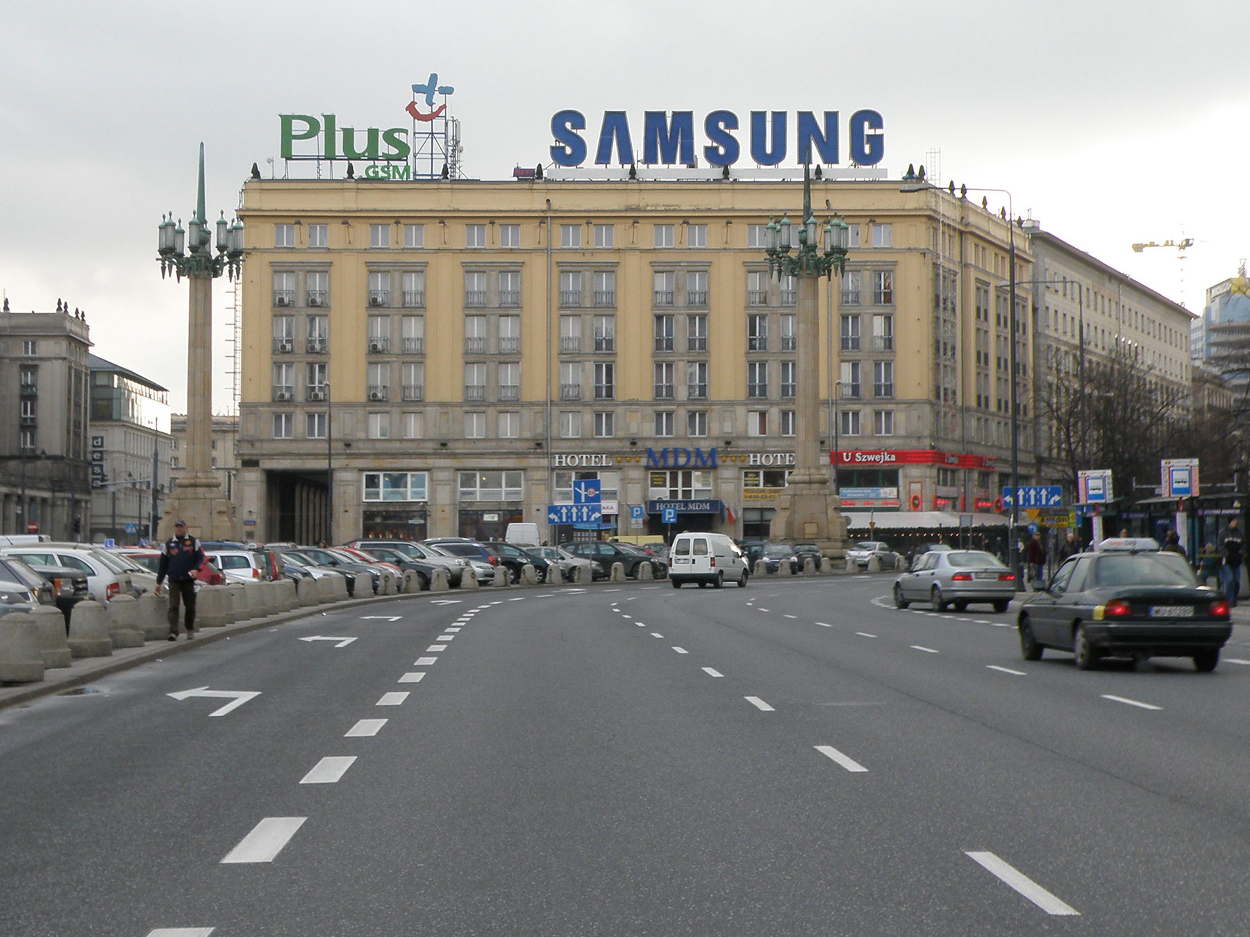 Warszawa, Plac Konstytucji, w tle Hotel MDM